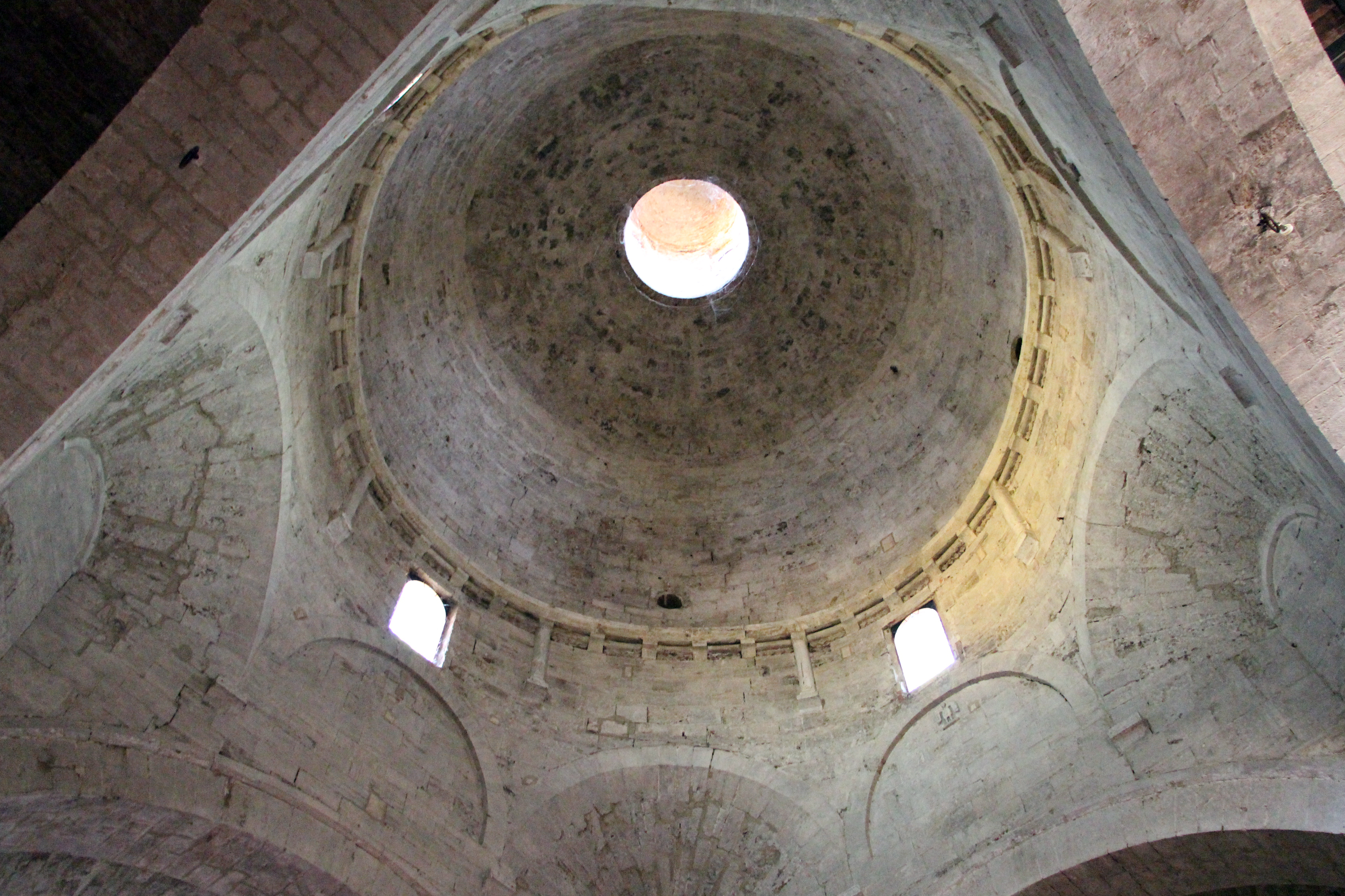 Asciano (si)